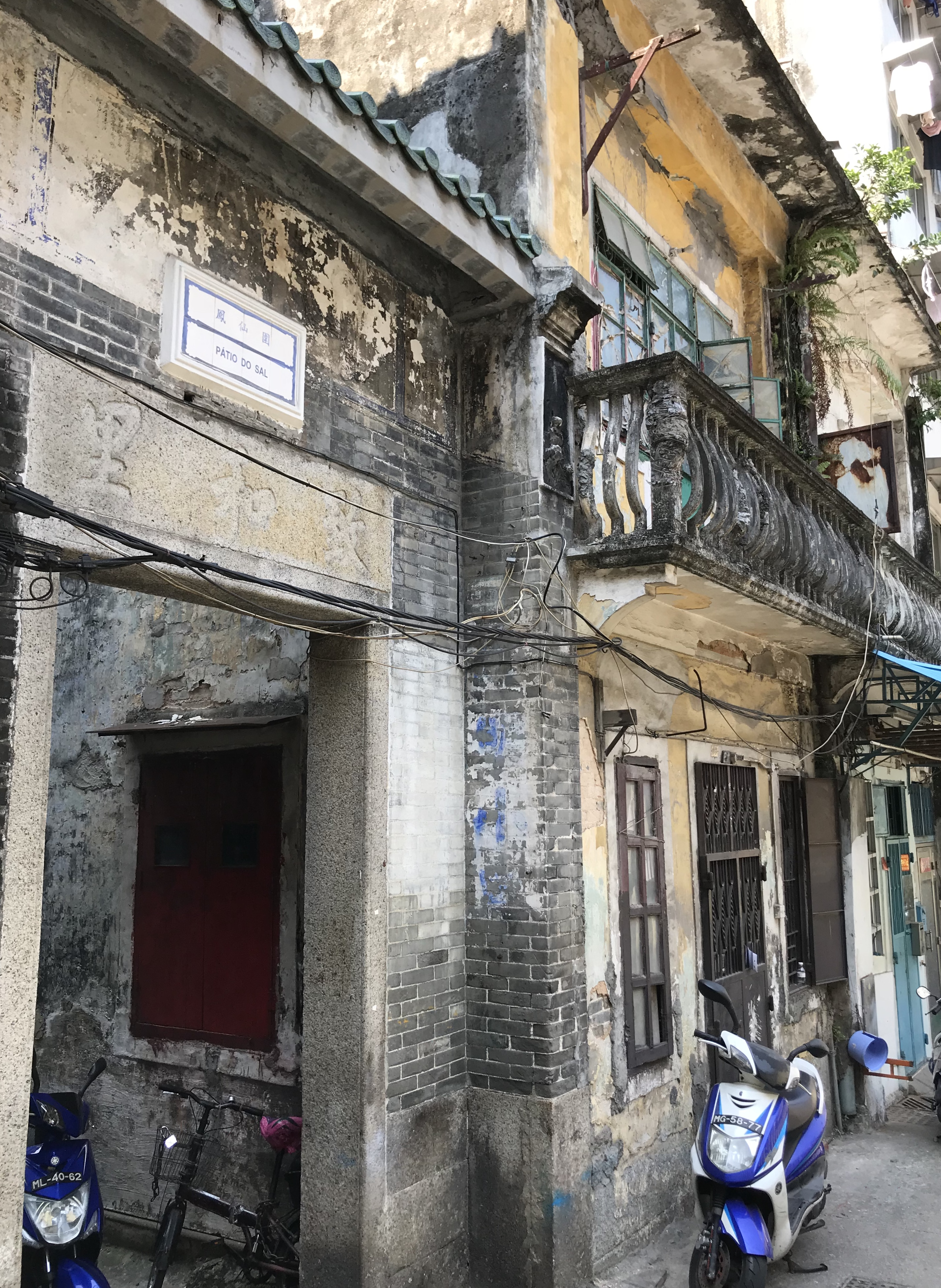 鳳仙樓入口